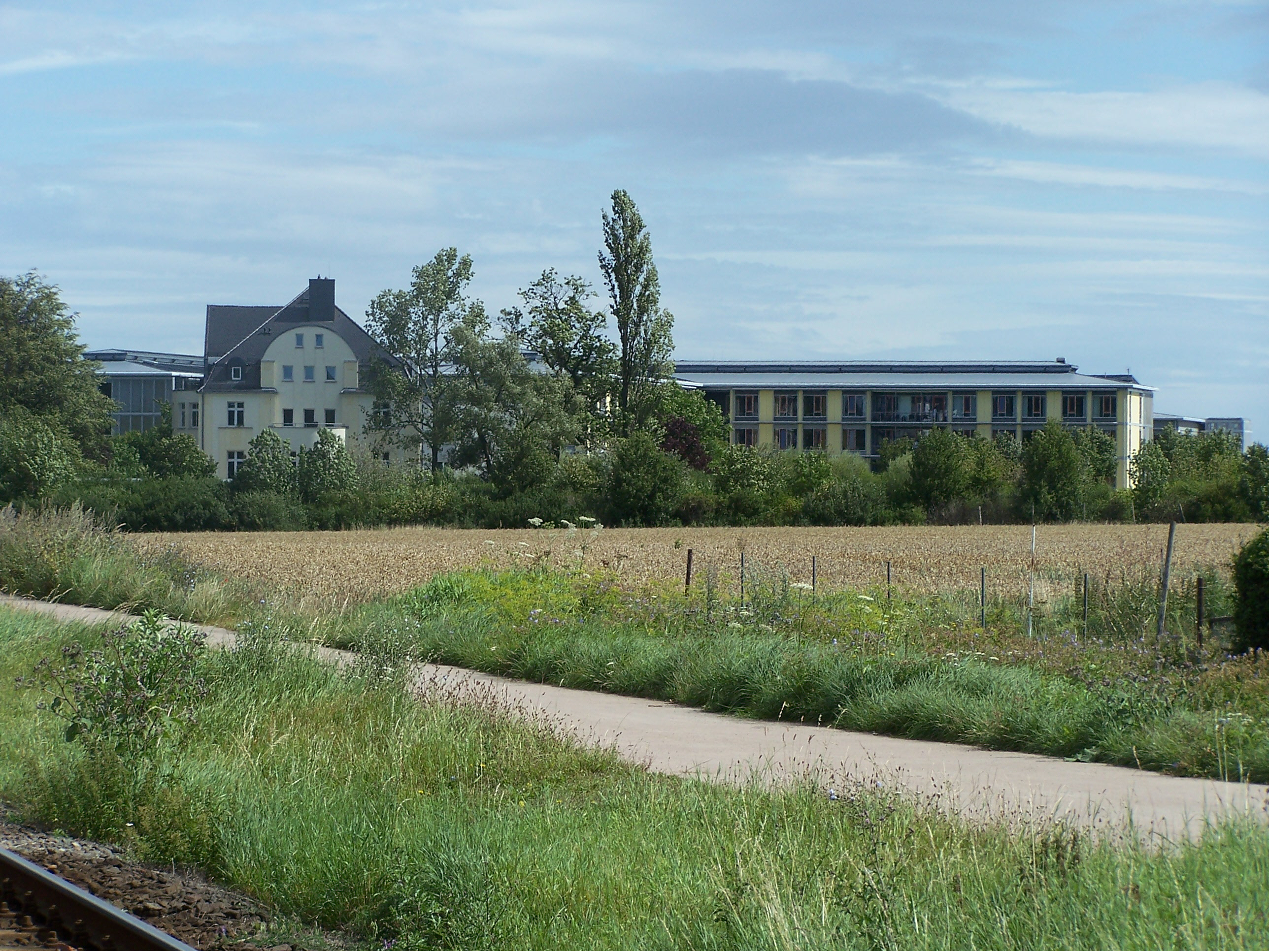 Das HELIOS-Klinikum in Gotha Sundhausen